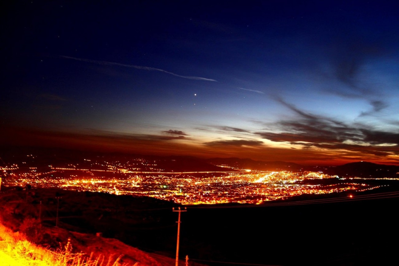 Harput'tan bir akşam görünümü